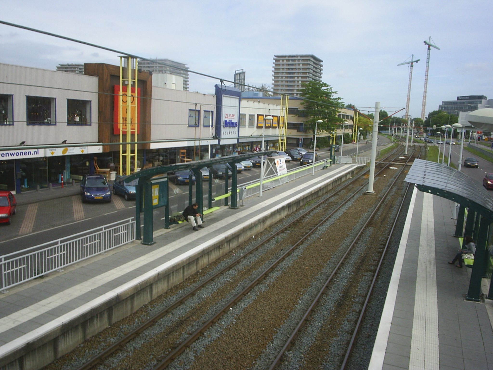 Sneltramhalte Kanaleneiland Zuid